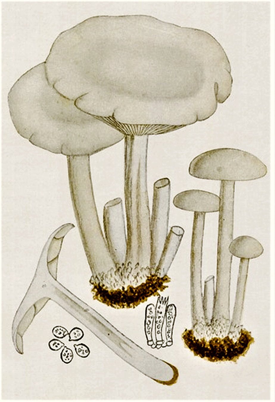 Giacomo Bresadola: Clitocybe cerussata (Fr., 1821) P.Kumm. (1871), heute Clitocybe phyllophila (Pers., 1801) P.Kumm. (1871)